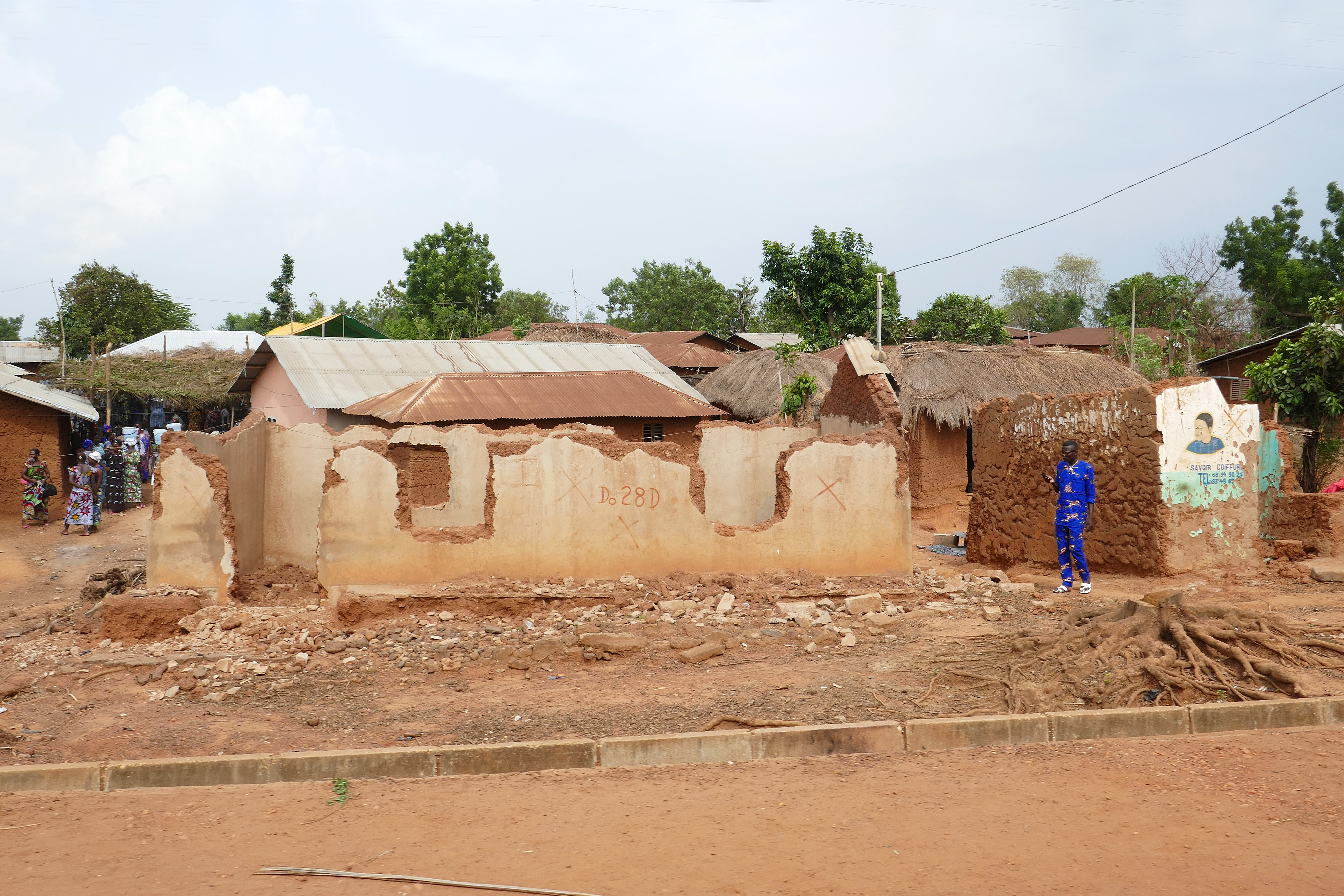 Lokossa (Bénin) : en vertu d'un décret présidentiel, destruction des maisons non conformes à la règlementation, car trop proches des routes. Généralement marquées par une croix rouge.